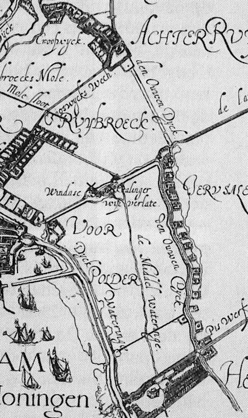 Detail of a map of Rotterdam from 1611 by Balthazar Florisz. van Berckenrode, showing Den Ouwen Dijck and Dijck Wateringe in Kralingen